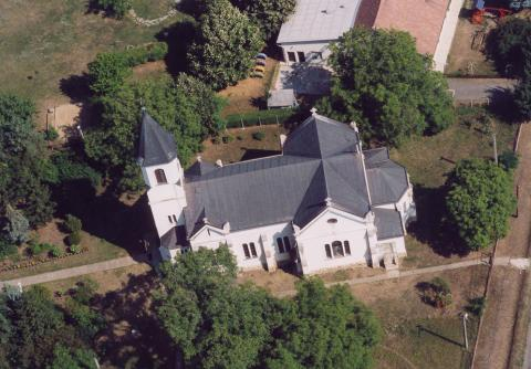 Tiszalúc, Hungary, aerialphotography. Szent István király római katolikus templom